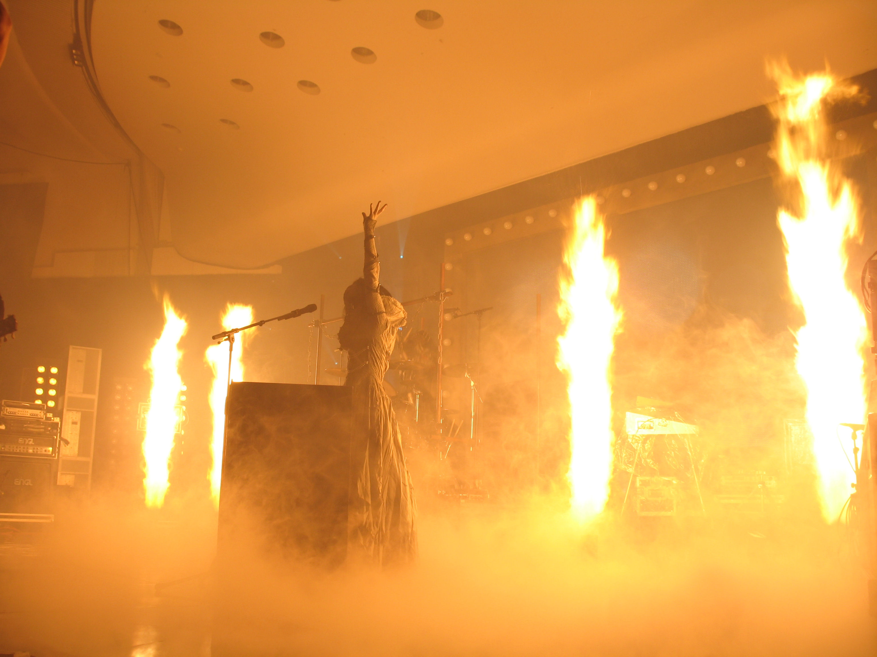 Lordi's pyrotechnic